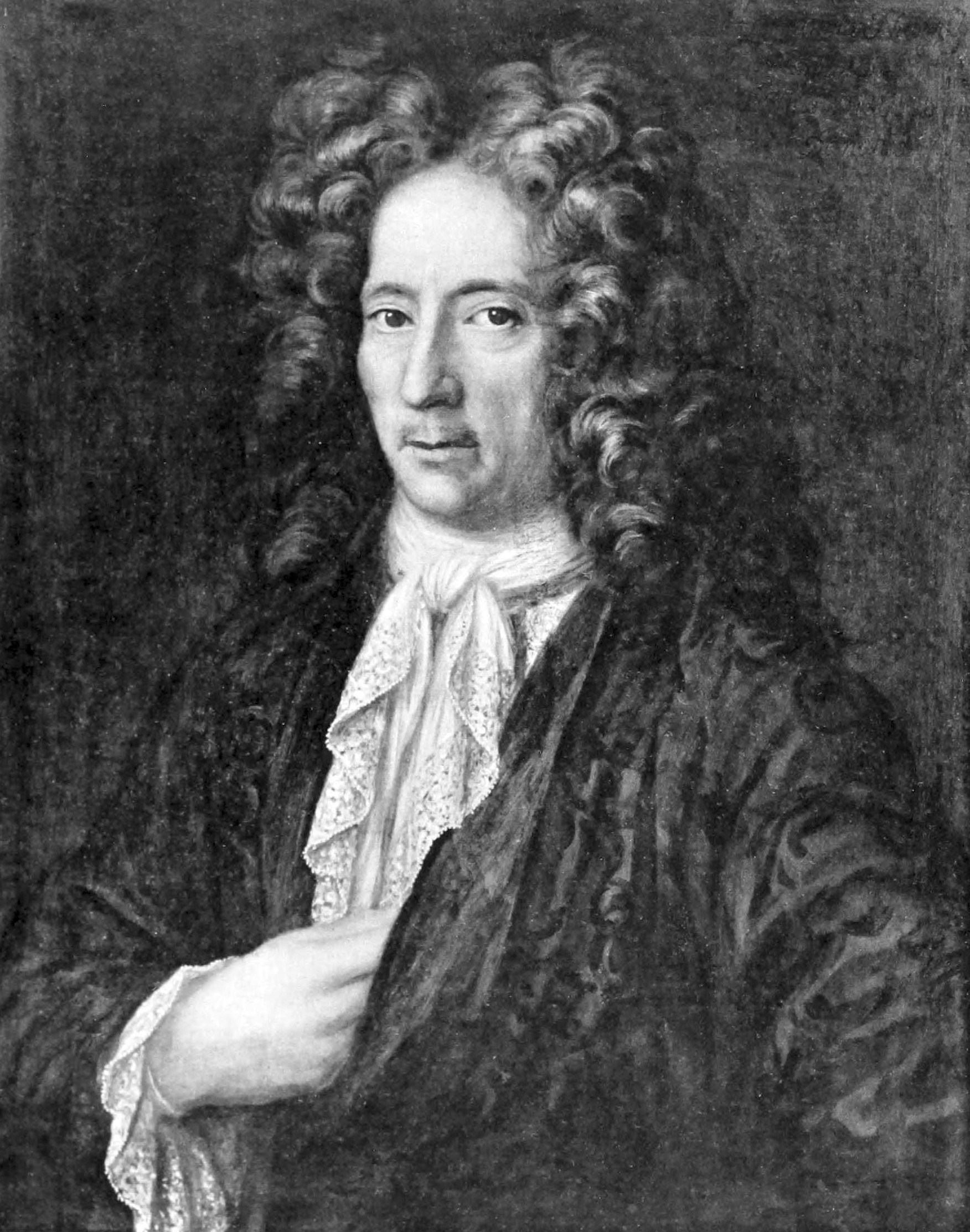 Herman Niclas Grim (1641-1711). Äldre man, bröstbild, fas t. h., sticker venstra handen innanför rocken. Bruna ögon, grå ögonbryn, kortklippta små öfverrakade mustascher. Grå allonge-peruk med stora lockar delad i midten, hvit lindad halsduk i knut med nedhängande ändar, spetsmanschetter. Gul fasonerad rock, svart fasonerad blåfodrad talar. Mörkgrå bakgrund, uppe t. v. står: Hermannus Nicolai Grim med. Doet. Natus Wisby 1641, Denatus 1711. Olja på duk, 74Y2X59 ctm., från 1690-talet. Medicinalstyrelsen. Eich. o 28. — PI. XVII. — Det är Chr. Eichhorn, som till-skrifvit Martin Mijtens porträttet. Jag är ej fullkomligt öfvertygad om riktigheten häraf, men anser mig ej heller hafva nog starka skäl att förneka den.